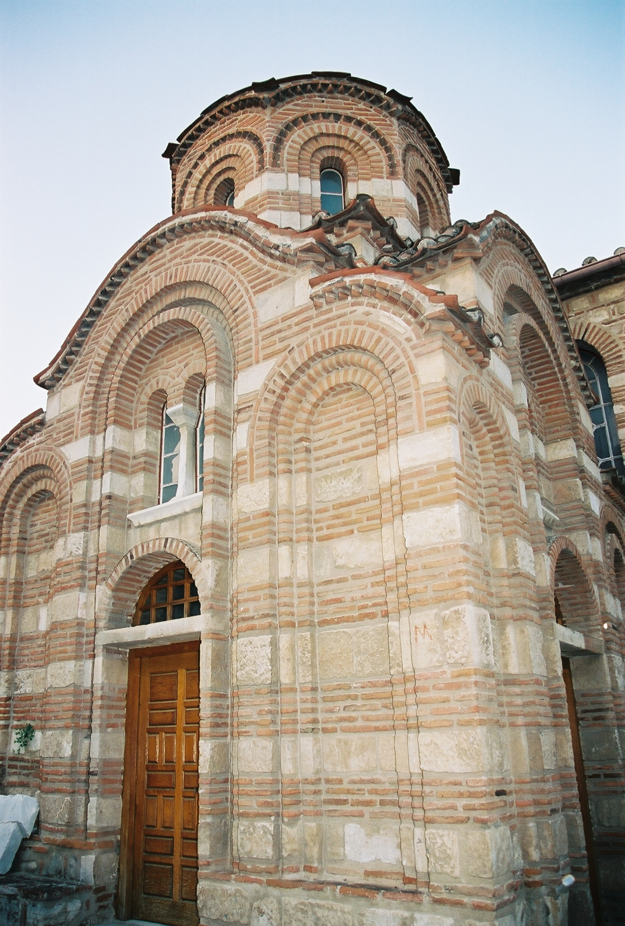 Basilique Saints-Théodores, Serrès, Grèce